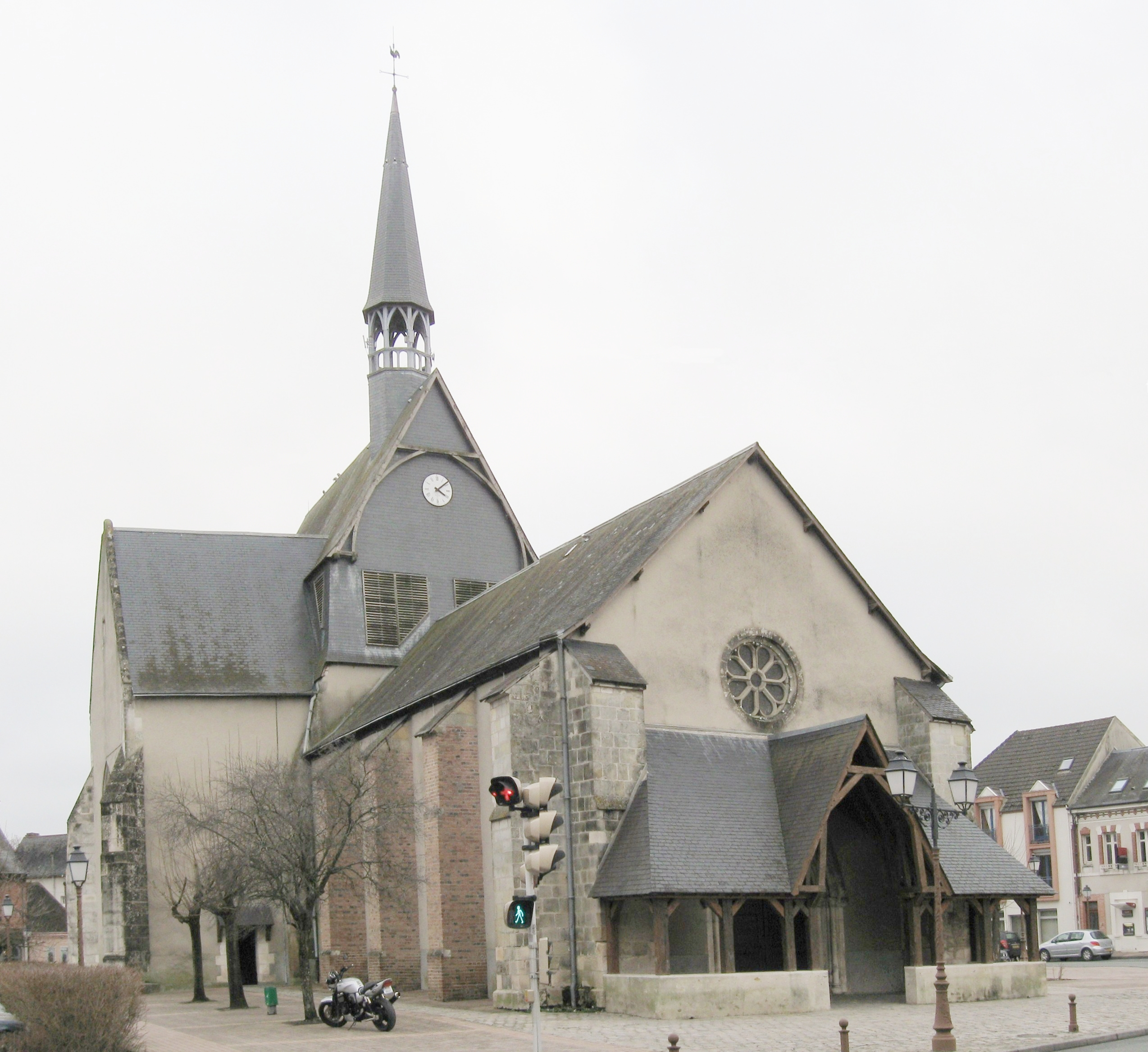 Église Saint-Georges, Salbris, Loir-et-Cher, France